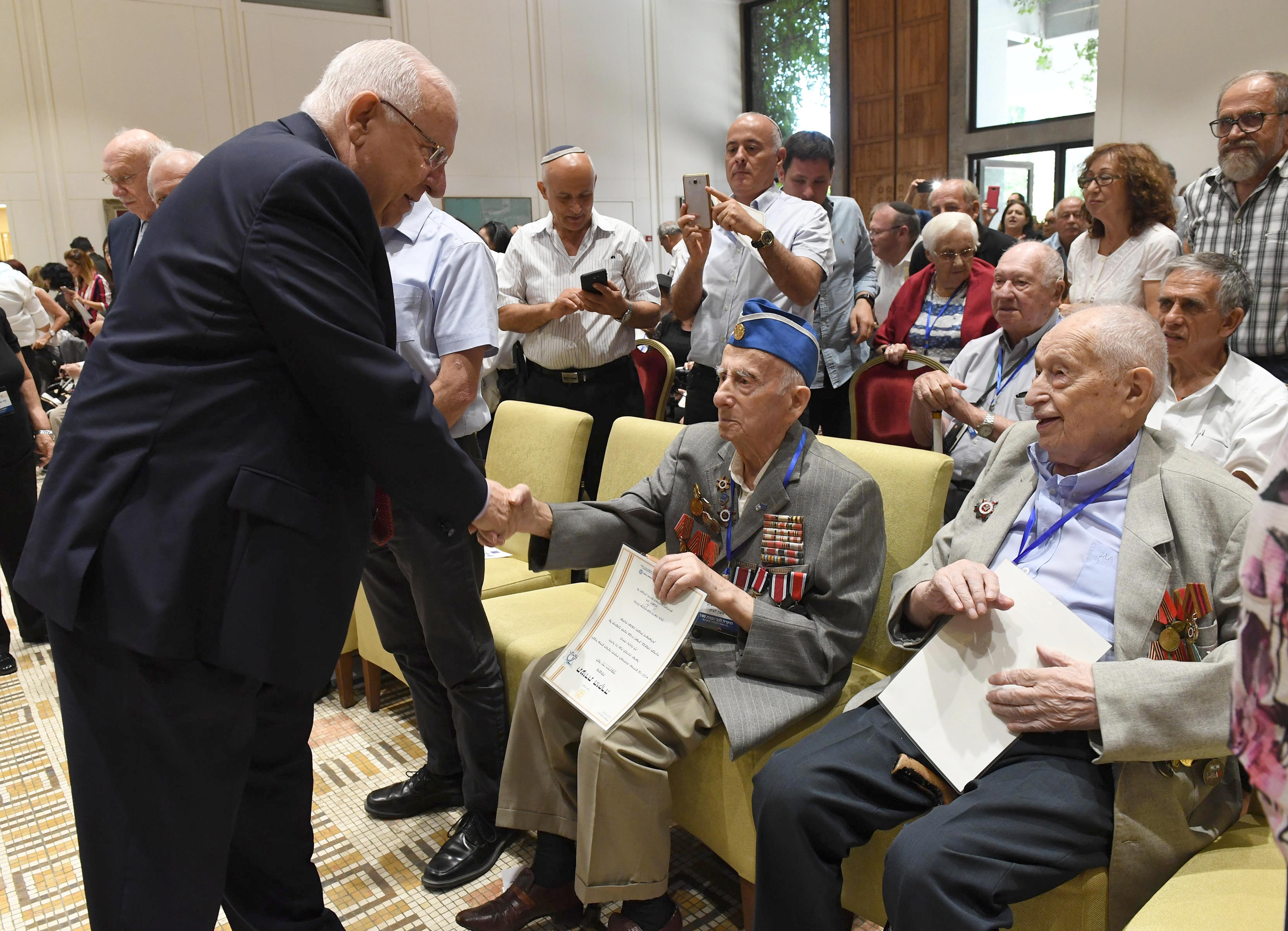 ראובן ריבלין שיא המדינה אירח באירוע חגיגי להוקרת פועלם ותרומתם של אזרחים ואזרחיות בני 100 ומעלה, לרגל שנת ה-70 למדינה ראובן (רובי) ריבלין עם יורי רודינסקי בן 101, מוותיקי הצבא האדום שלחם במלחמת העולם השנייה.